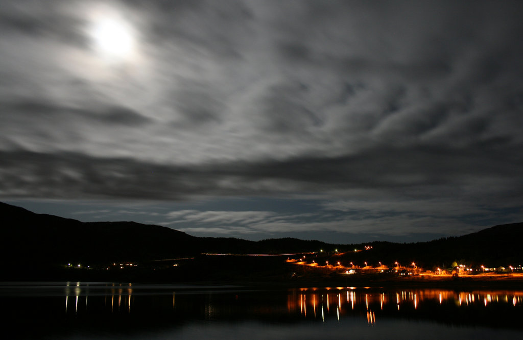 Bilde av Kvenvik tatt mot sydaust.